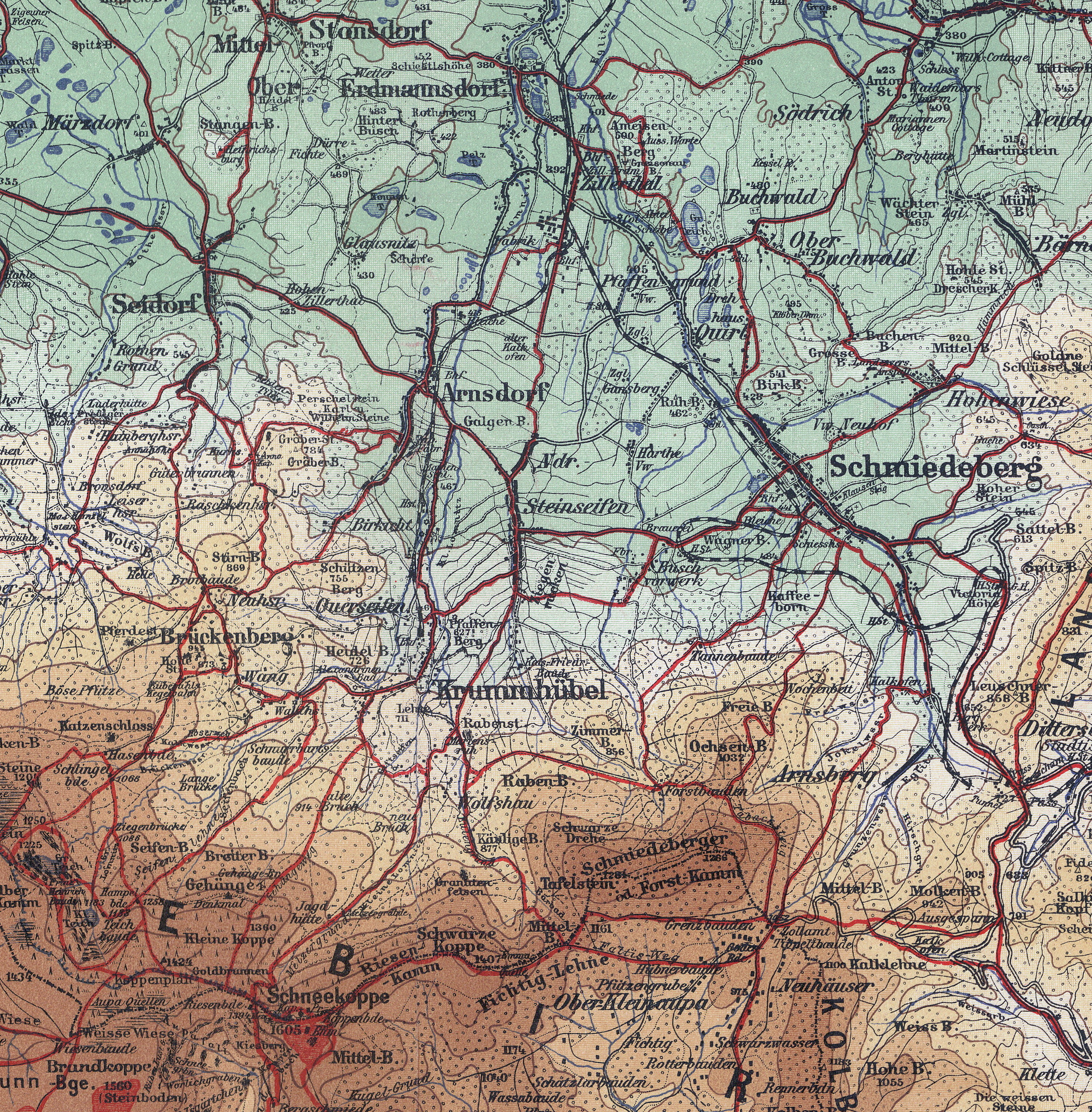 Riesengebirge, Detailkarte mir der Schneekoppe und dem Fremdenverkehrsort Krummhübel etc.